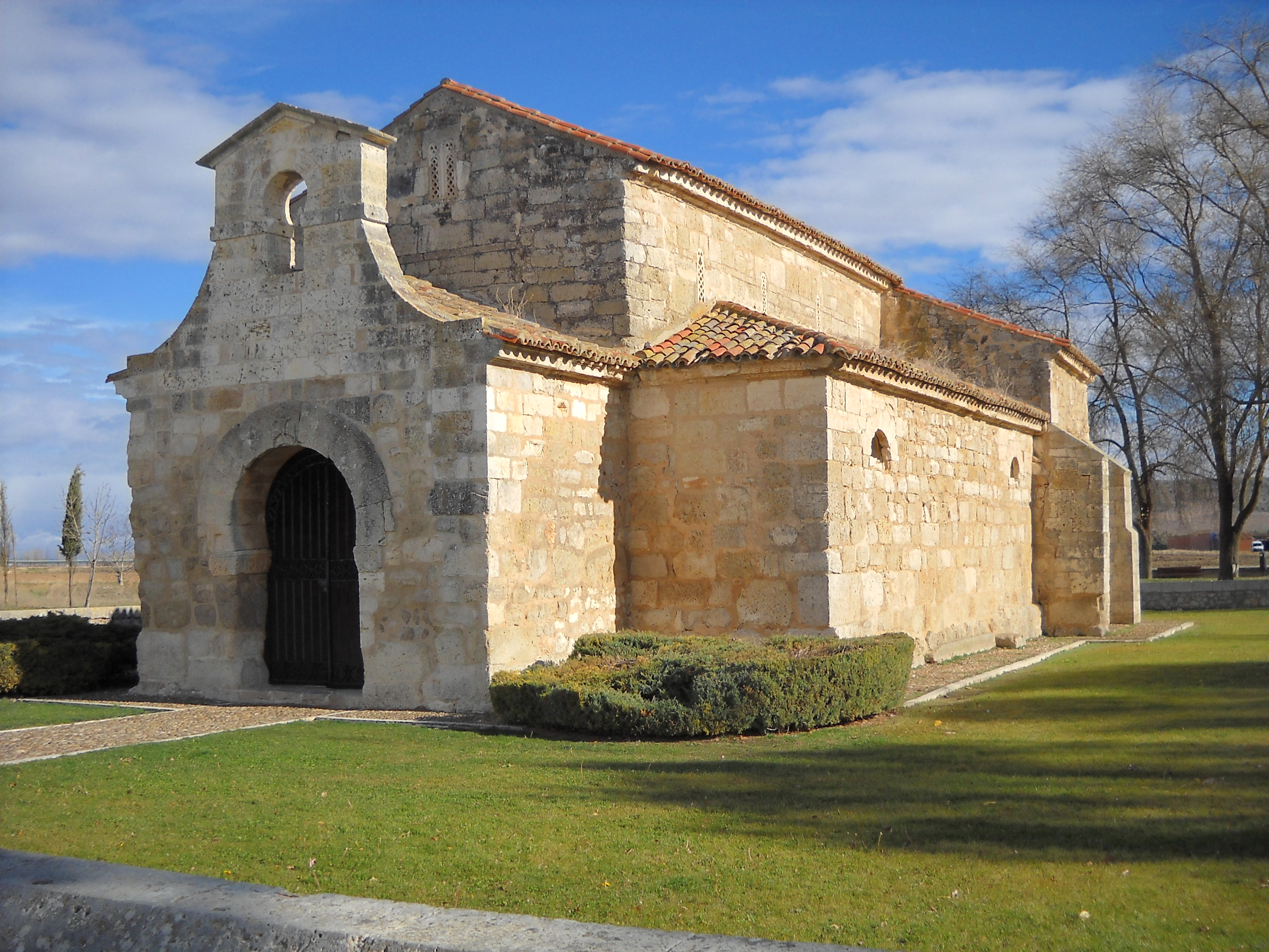 34200 Baños de Cerrato, Palencia, Spain